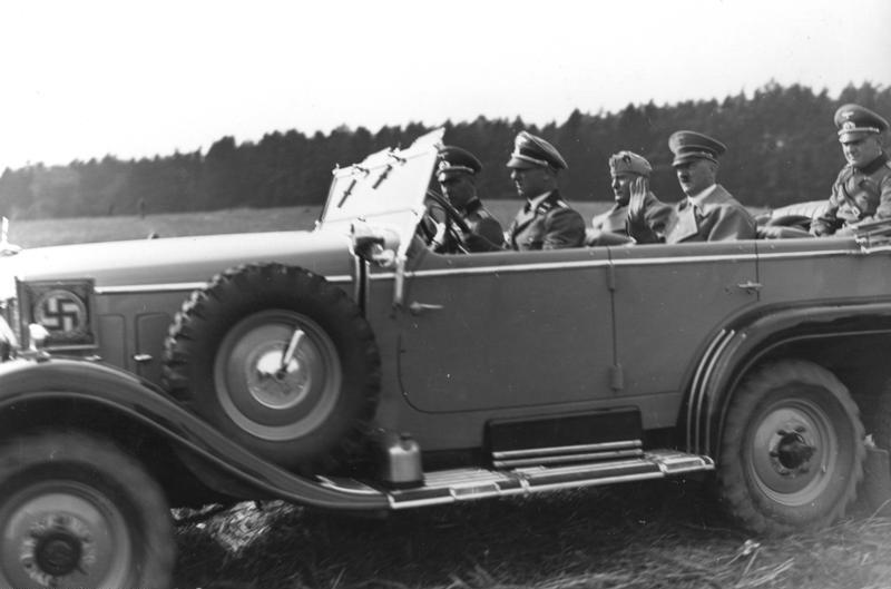 Wehrmachtsmanöver 1937 in Mecklenburg und Pommern Hitler und Mussolini im Manövergelände Hitlers Adjutant Oberst Hosbach Information added by Wikimedia users.